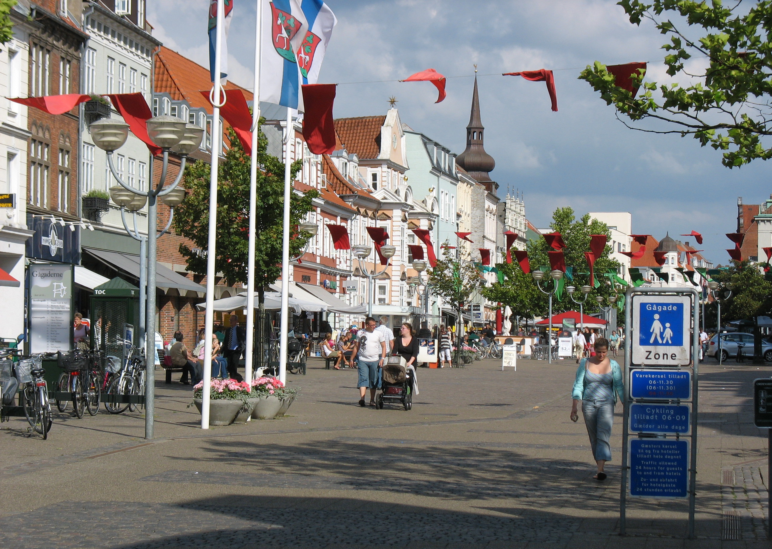 Søndergade, Horsens, Denmark - pedestrian zone